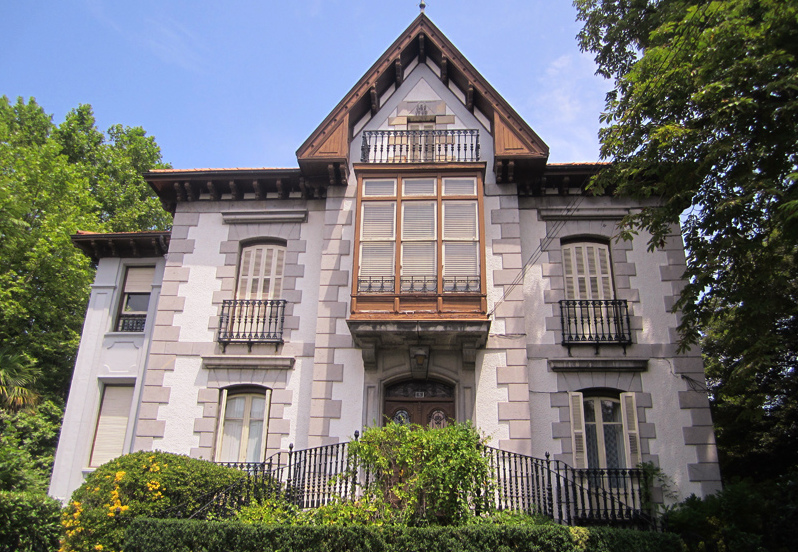 Antigua villa de Justo Sarachaga, actualmente convertida en el colegio "Virgen Niña".